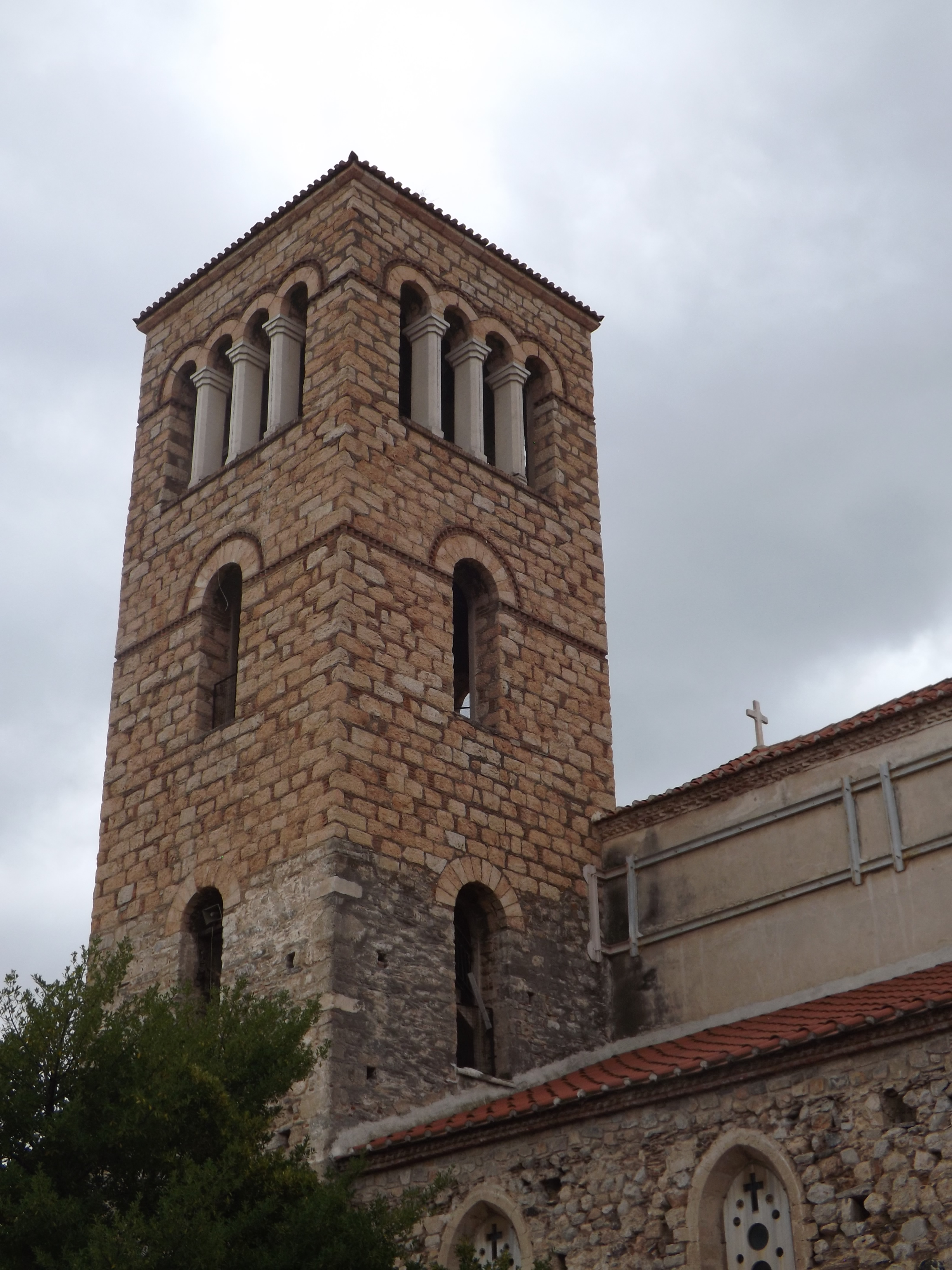 Ναός Αγίας Παρασκευής Χαλκίδας, καμπαναριό«Ναός Αγίας Παρασκευής Χαλκίδας»